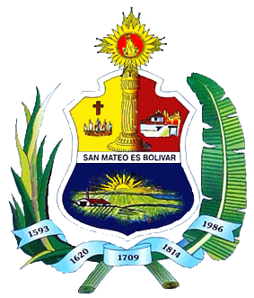 Escudo del municipio Bolívar, estado Aragua, Venezuela